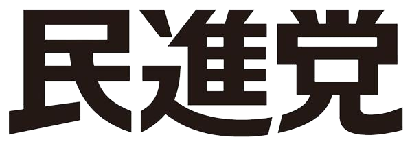 民进党標誌